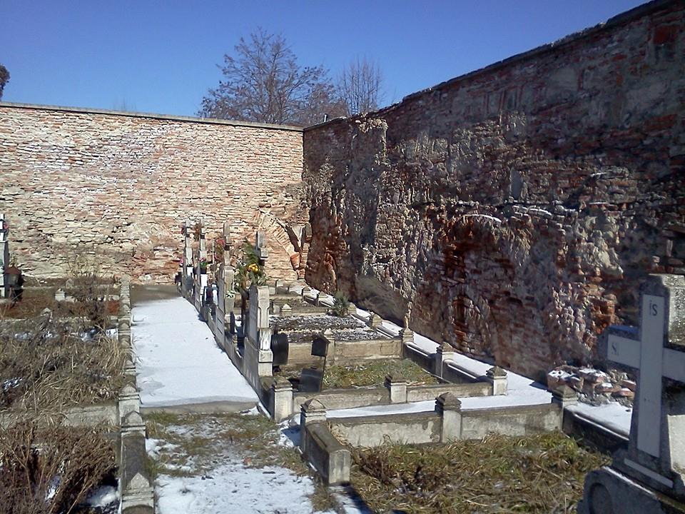 Zid de incintă 04